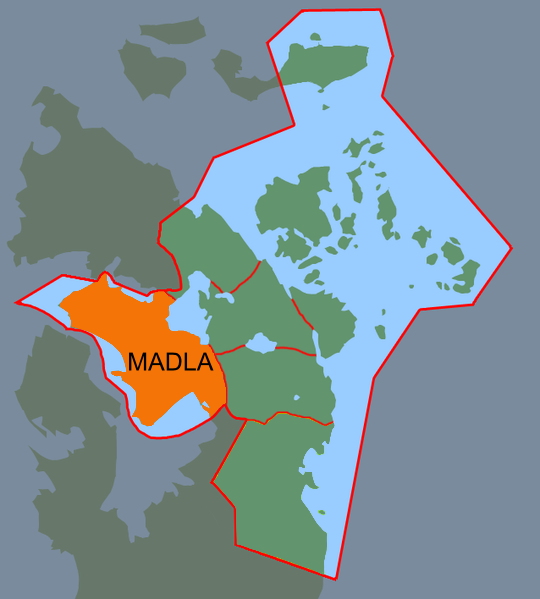 Carte de Stavanger avec l'arrondissement de Madla.